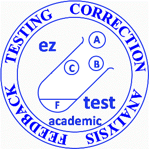 සිංහල: eztest academic 1.0 ලාංඡනය